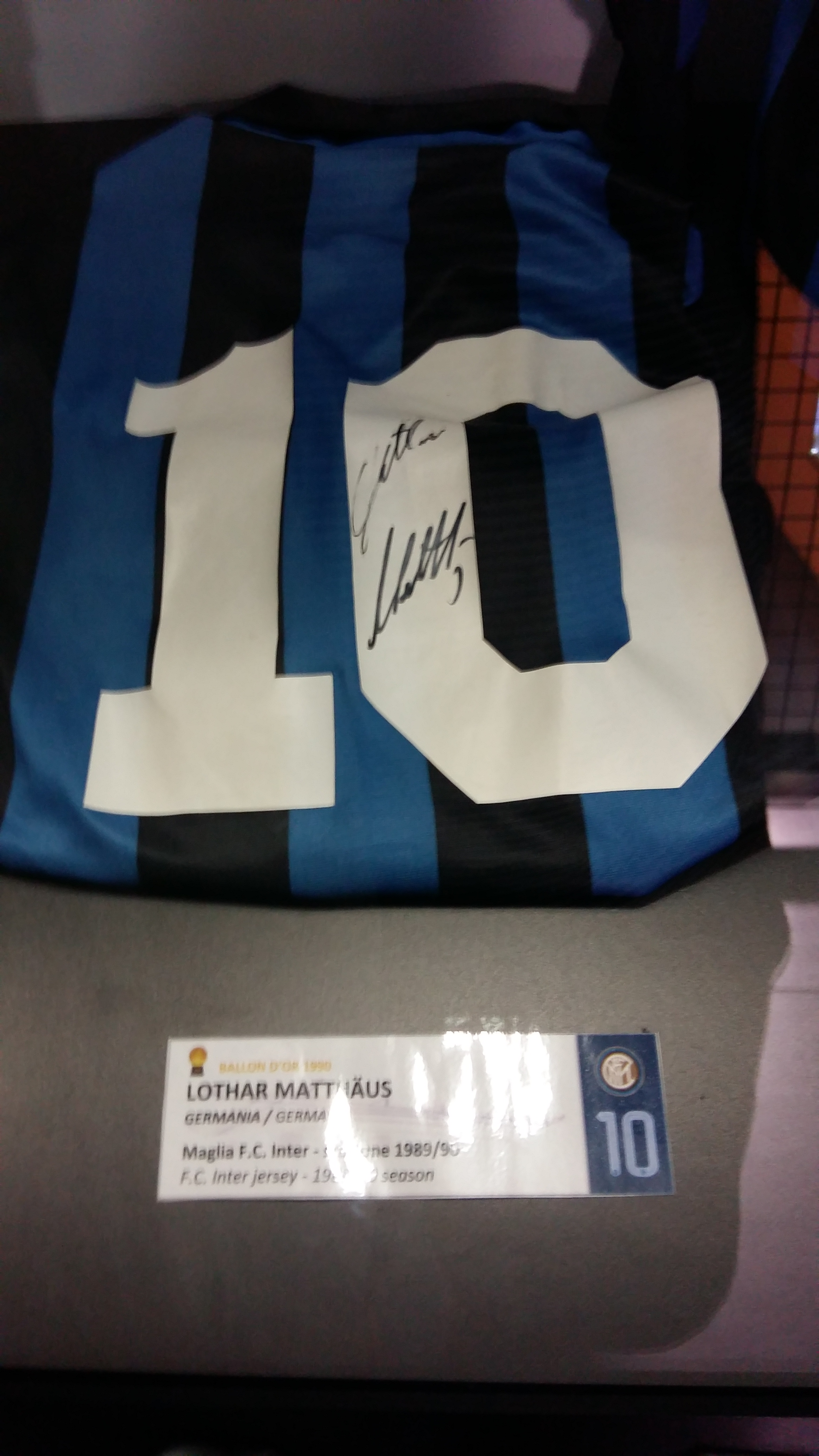 Футболка Лотара Маттеуса (1989 год) в музее Сан-Сиро.